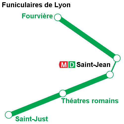 Map of Funiculaire de Lyon, France.